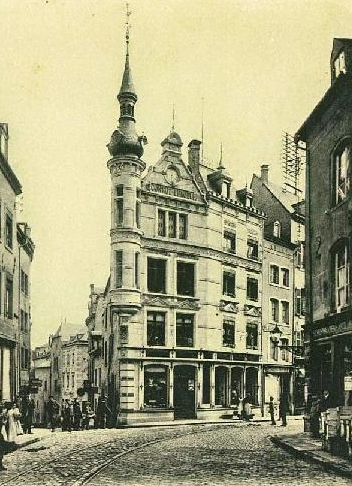 Luxembourg, maison Conrot (vers 1900)